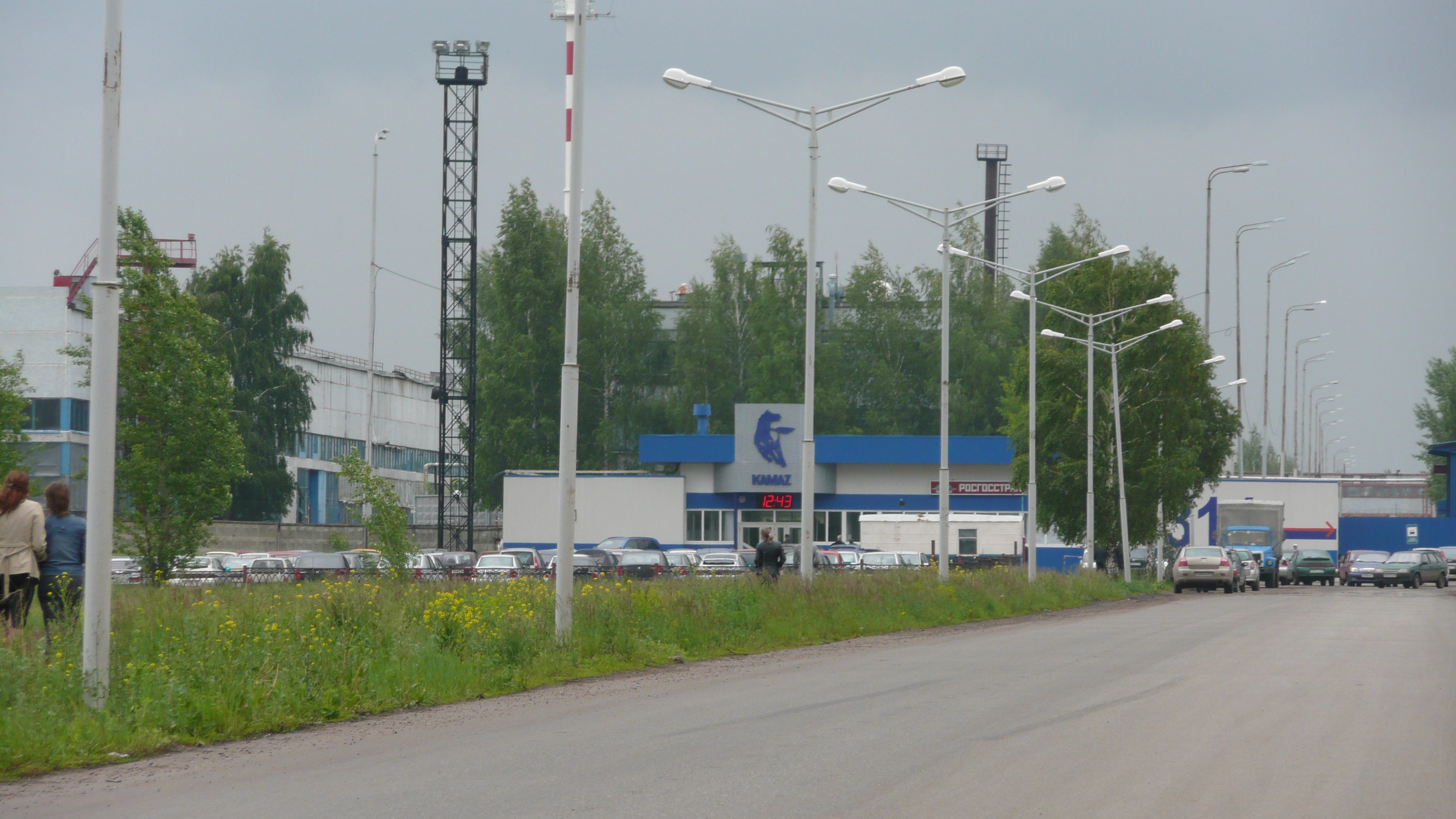 Kamaz in Naberezhnye Tchelny